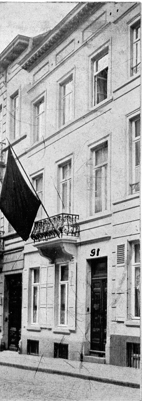 Maison du 91, rue Souveraine à Ixelles, où habitait le peintre-décorateur Gabriel van Dievoet (l'atelier donnait à l'arrière rue d'Orléans)